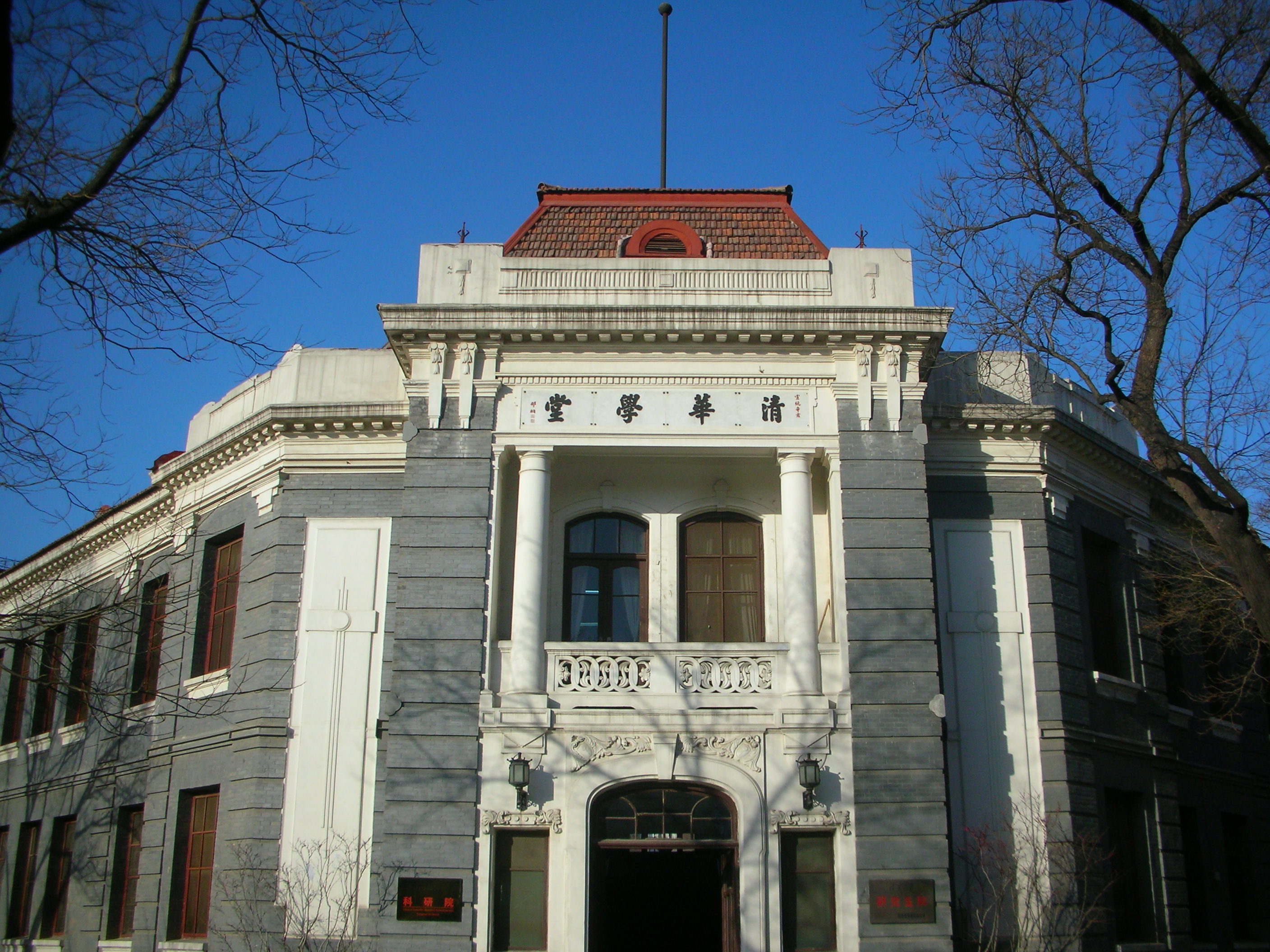 清华学堂 Bân-lâm-gú: Tshing-huâ O̍h-tn̂g. 清華學堂